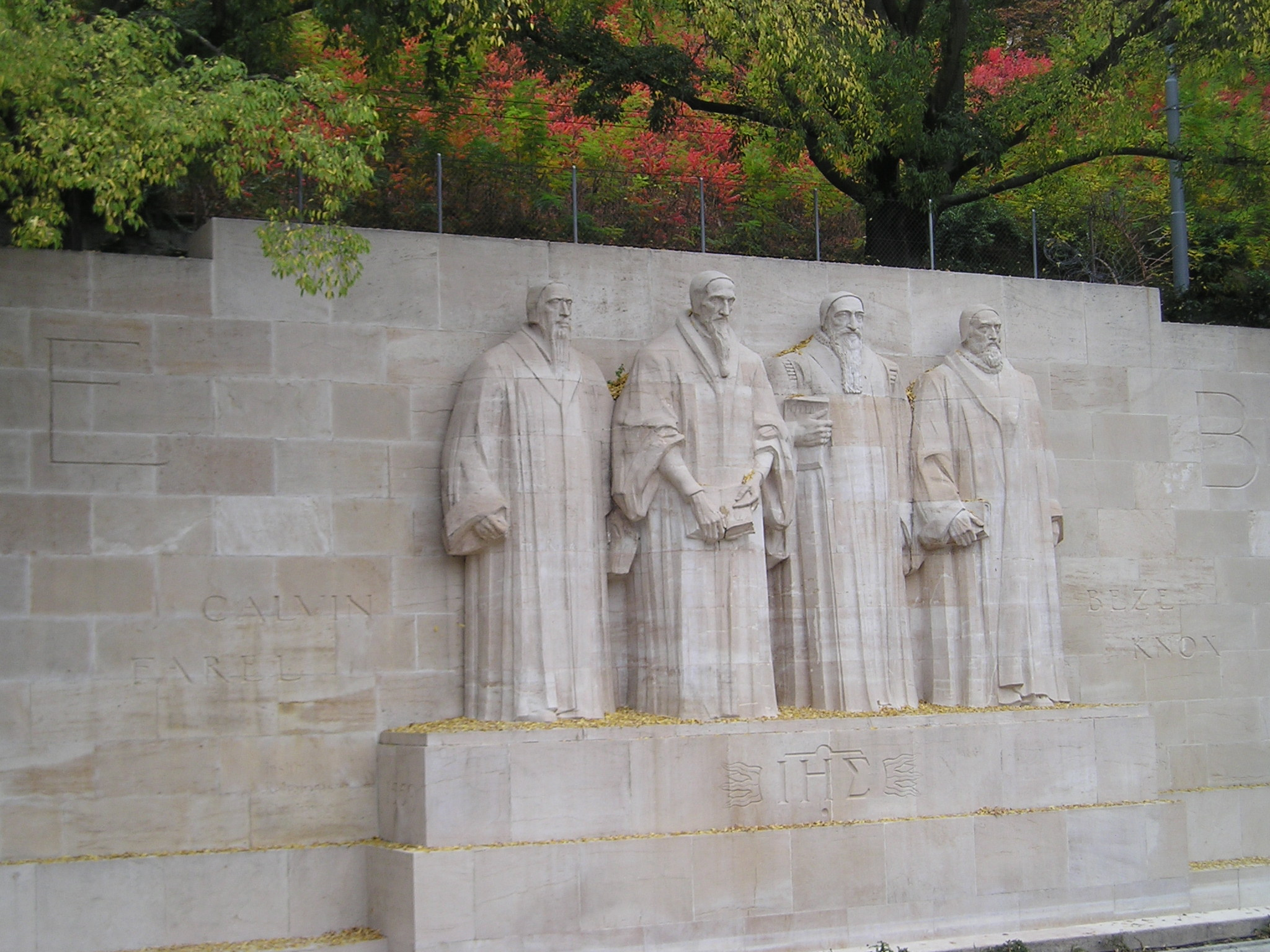 monumenti ai riformatori, Ginevra ( 30.10.2006)